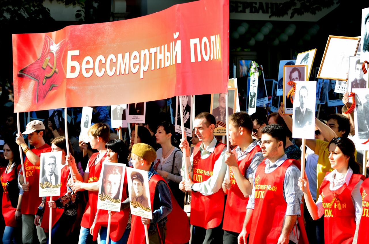 Бессмертный Полк, 9 мая, Ростов-на-Дону